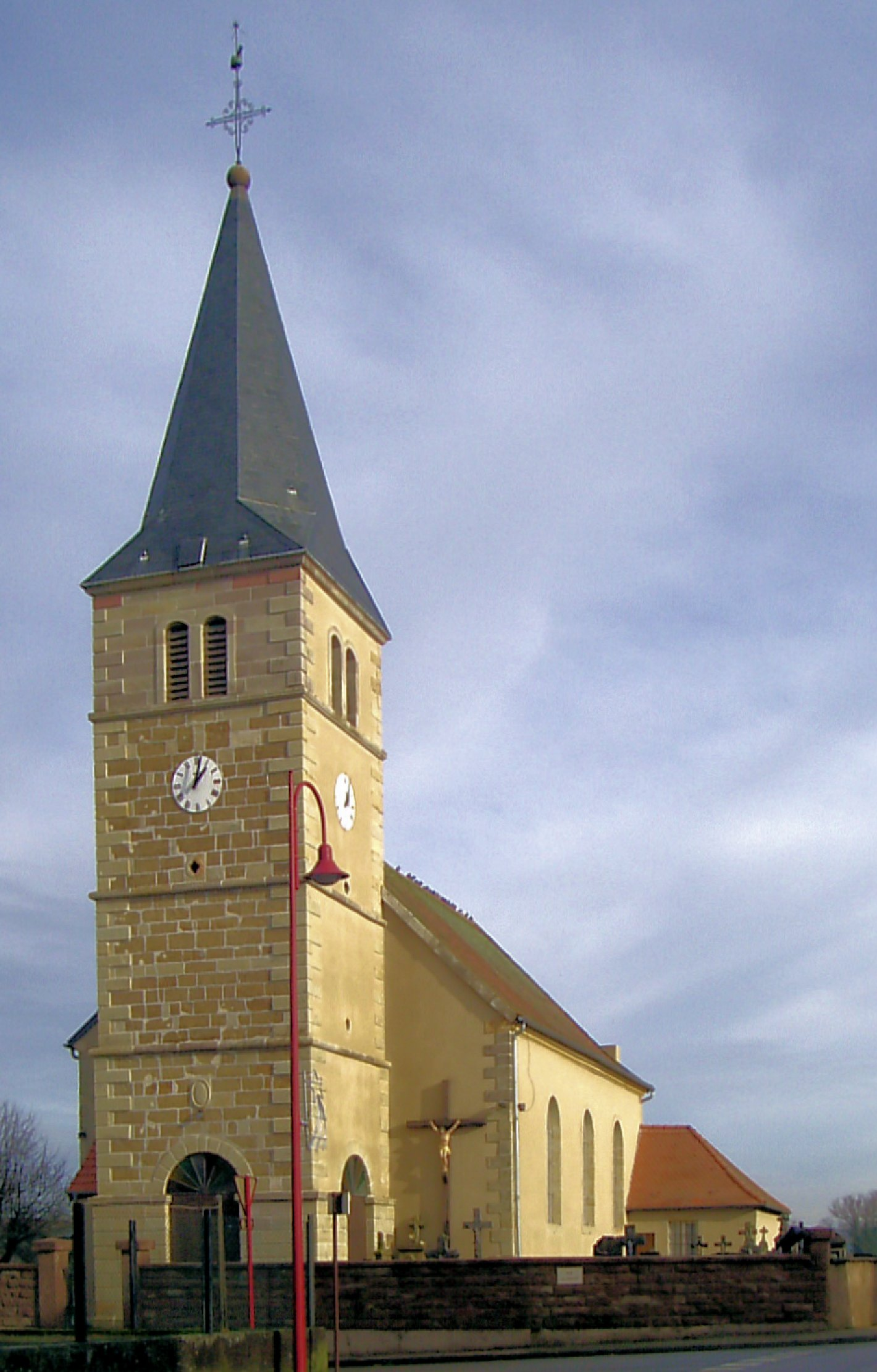 L'église Sainte-Barbe à Biding